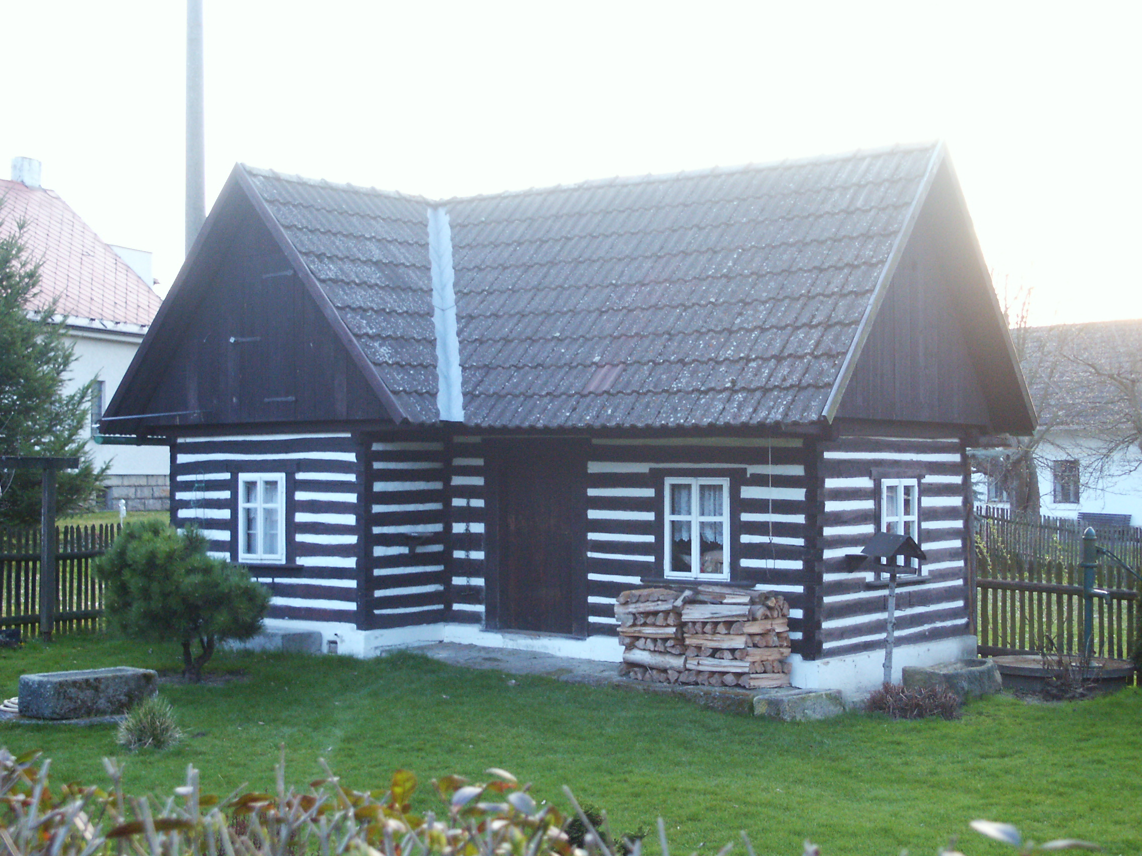 Ohařice - roubenka u č.p. 43